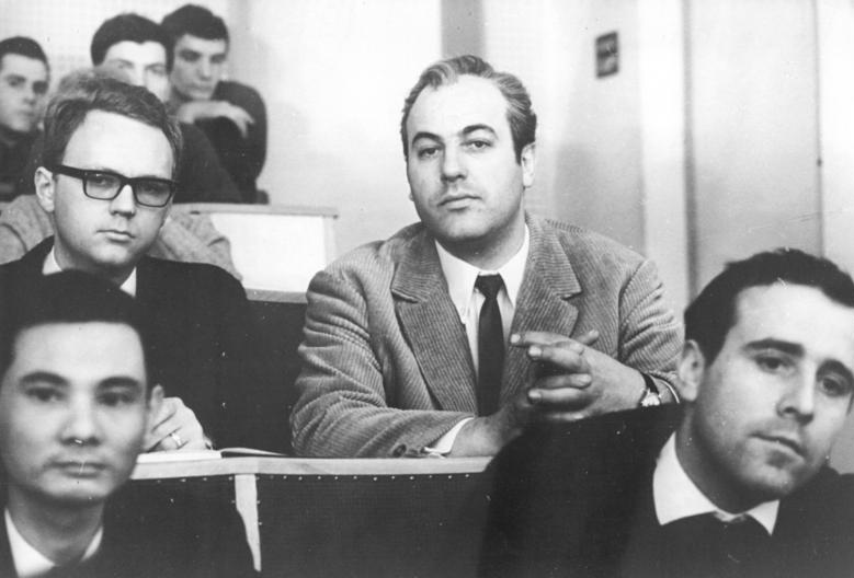 Zentralbild-DEFA-24.8.70-pe-Berlin: "Netzwerk"-Manfred Krug spielt die Rolle eines Schriftstellers in dem neuen DEFA-Film "Netzwerk" von Ralf Kirsten (Regie), der am 29.8.70 in Leipzig uraufgeführt wird. Der Film, der in Schwedt gedreht wurde, schildert menschliche Probleme und Konflikte, die sich beim Aufbau eines Großbetriebes ergeben."